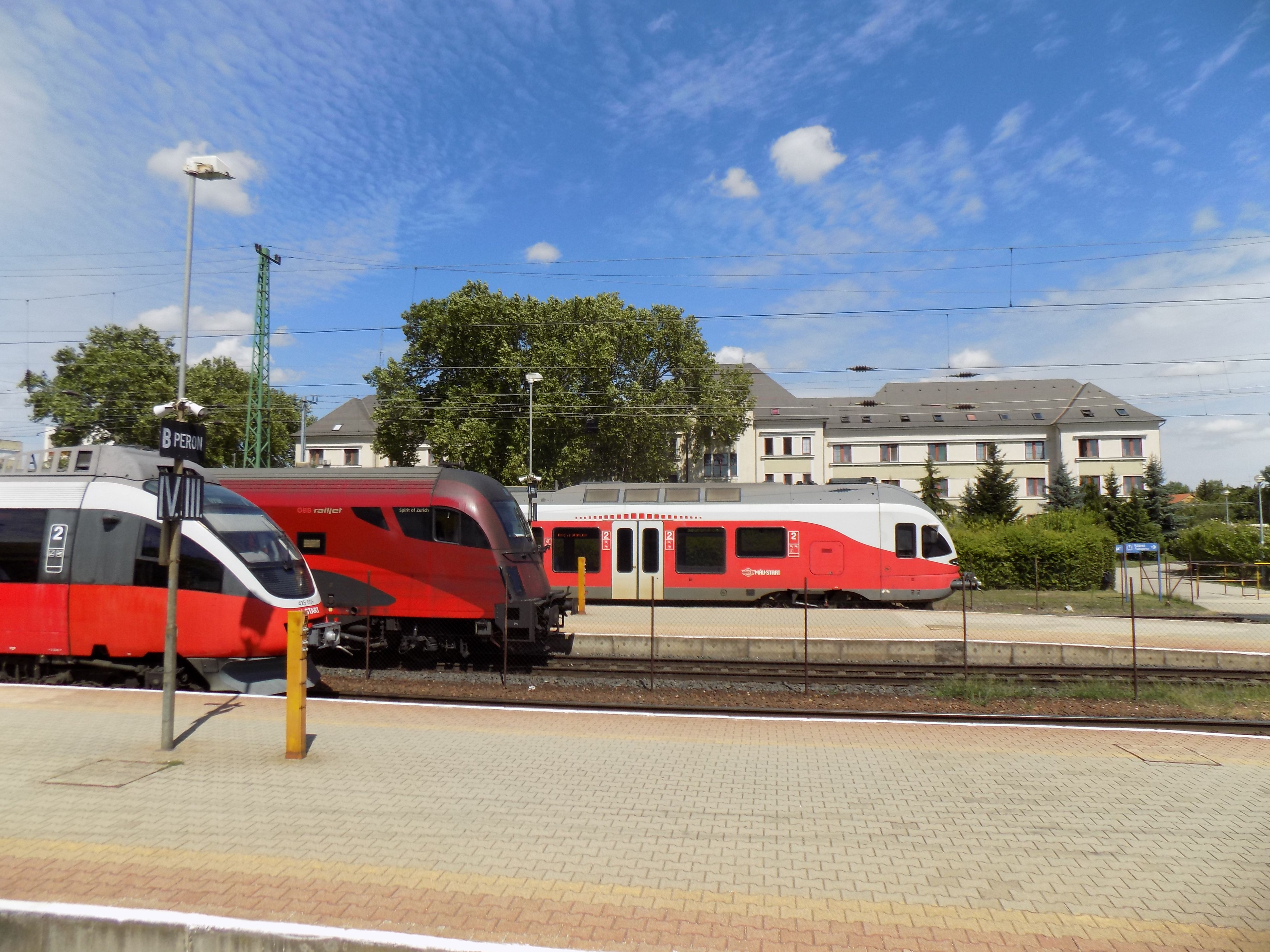 MÁV Siemens FLIRT és Bombardier Talent, illetve ÖBB railjet vonatok Hegyeshalom vasútállomáson